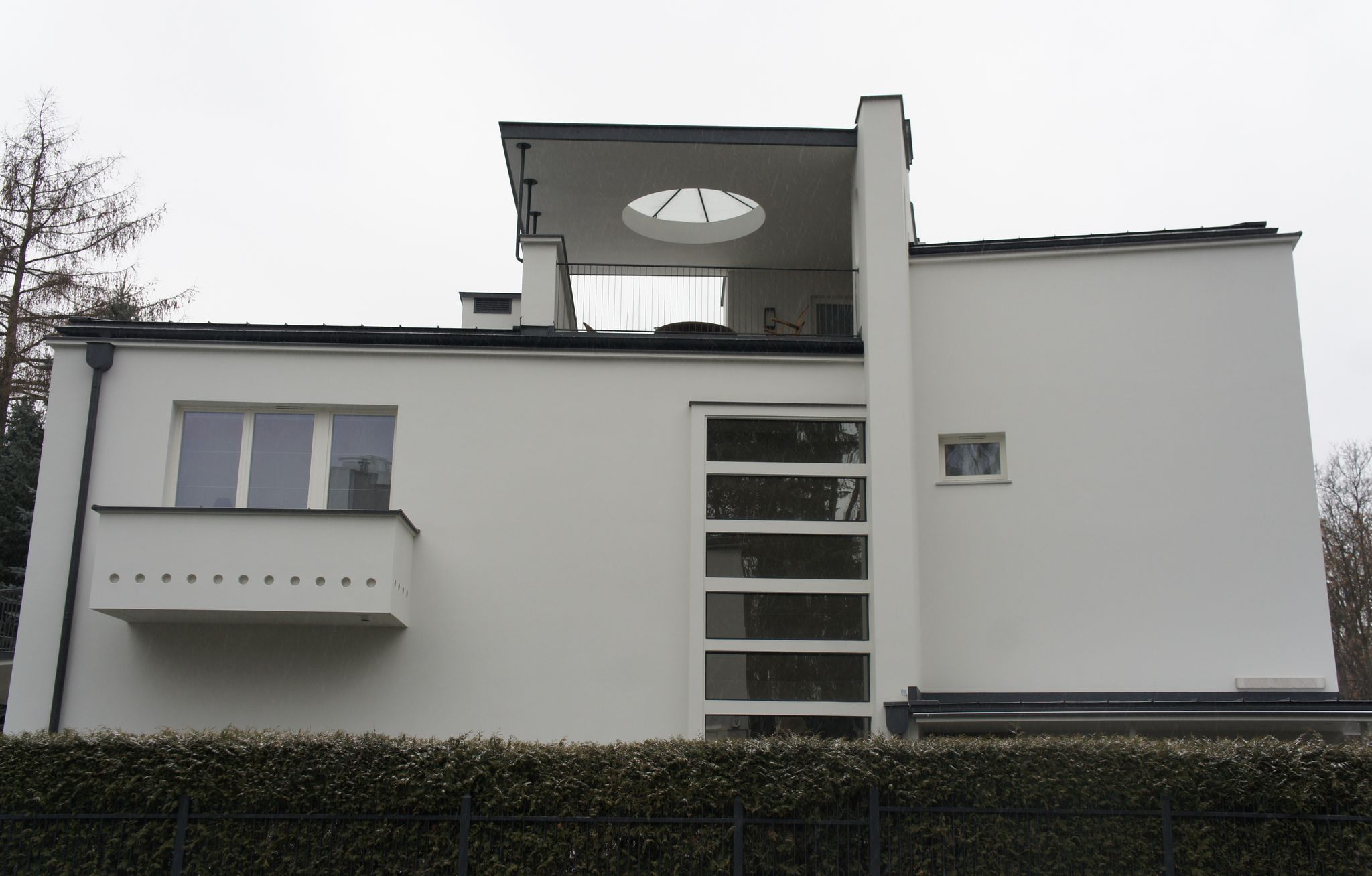 Willa Brzezińskich (ul. Obrońców 10/róg Katowickiej w Warszawie), zaprojektowana przez Piotra Kwieka, po 1935.